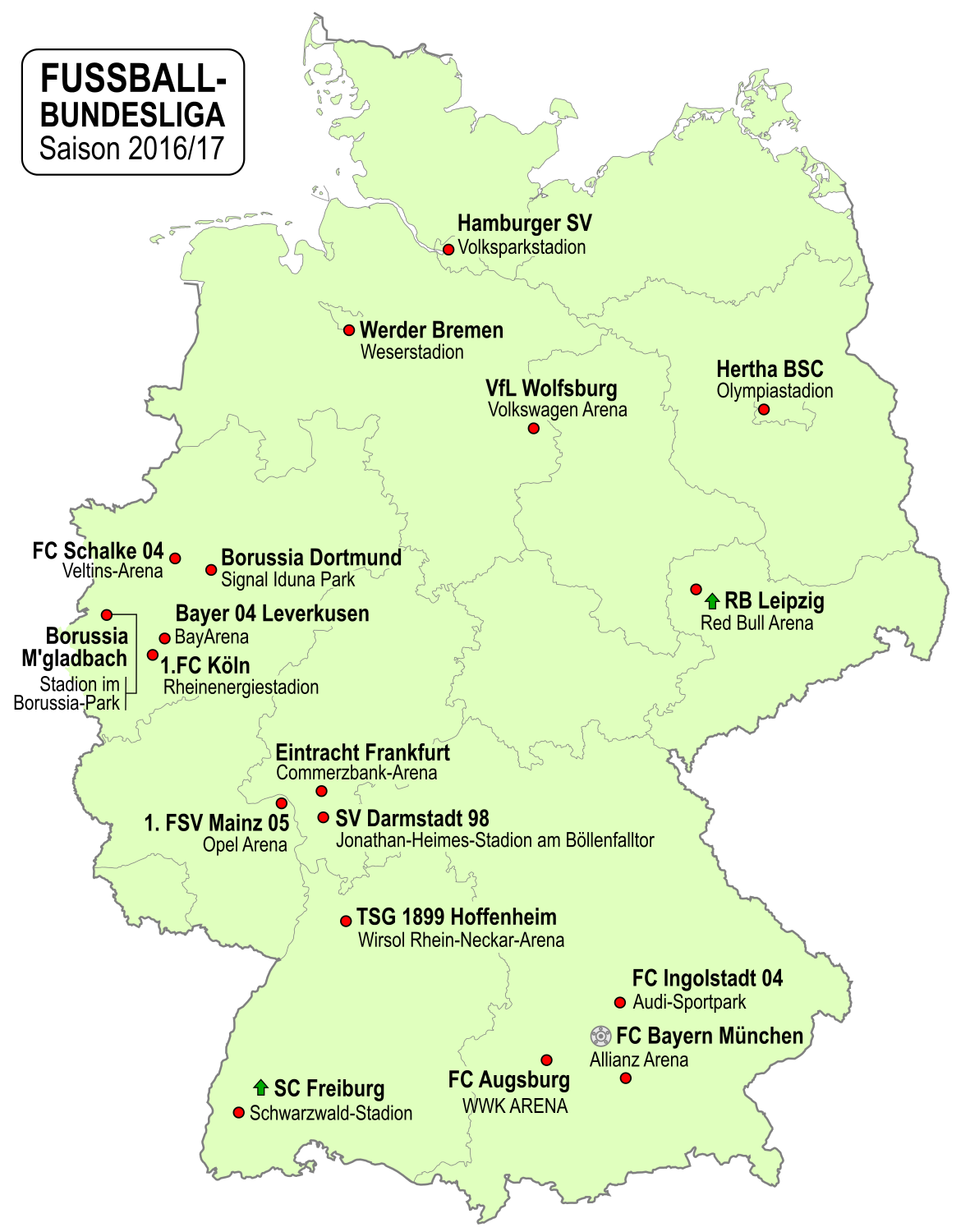 Karte der Vereine der Fußball-Bundesliga-Saison 2016/2017